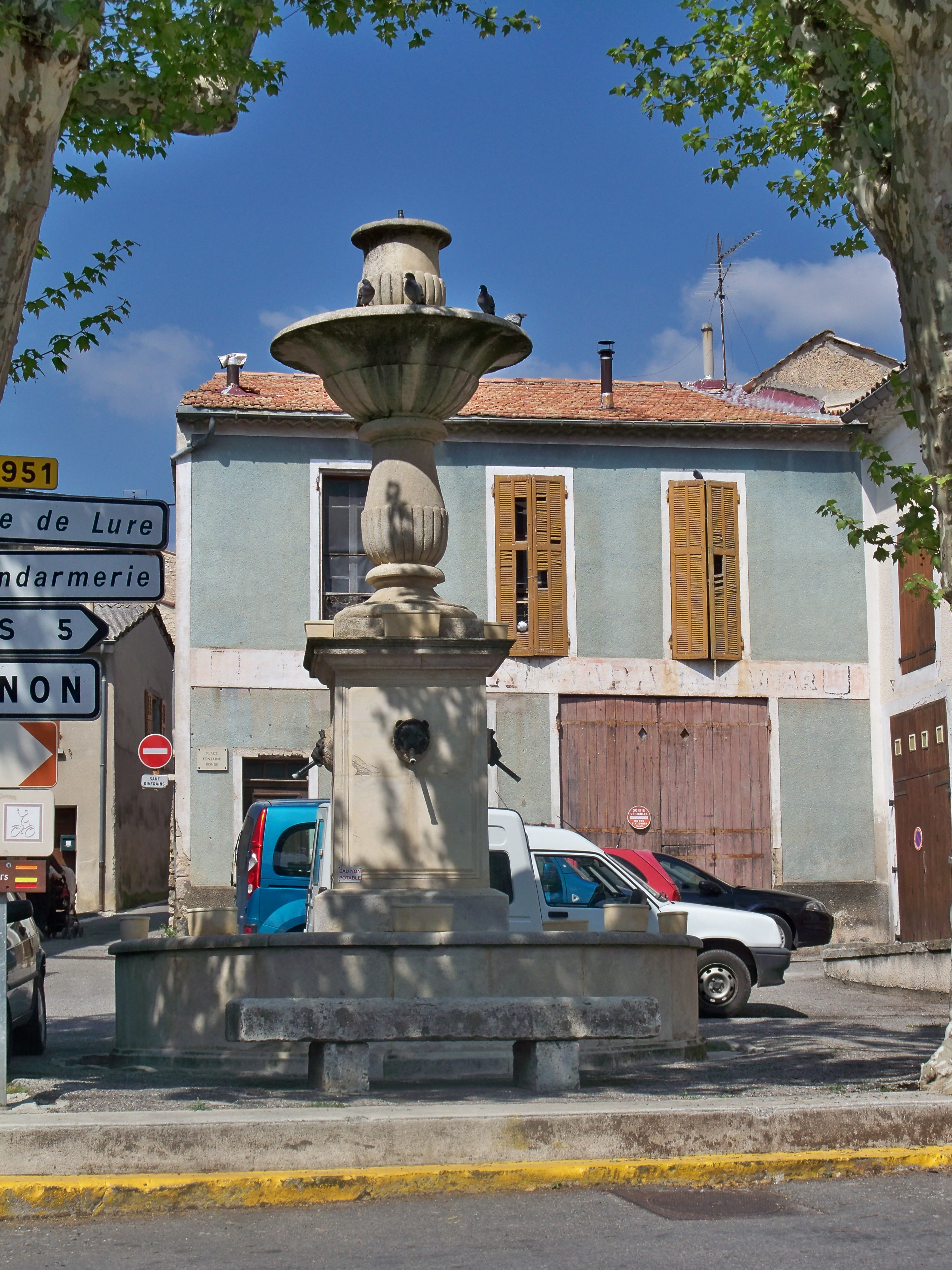 Fontaine à Saint Etienne les Orgues